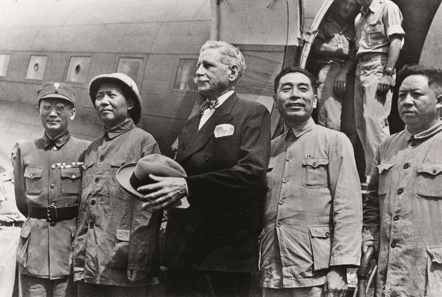 1945年，毛泽东赴重庆谈判。这是毛泽东离开延安时，在延安机场与赫尔利、周恩来、张治中等人合影。左起：张治中、毛泽东、赫尔利、周恩来、王若飞